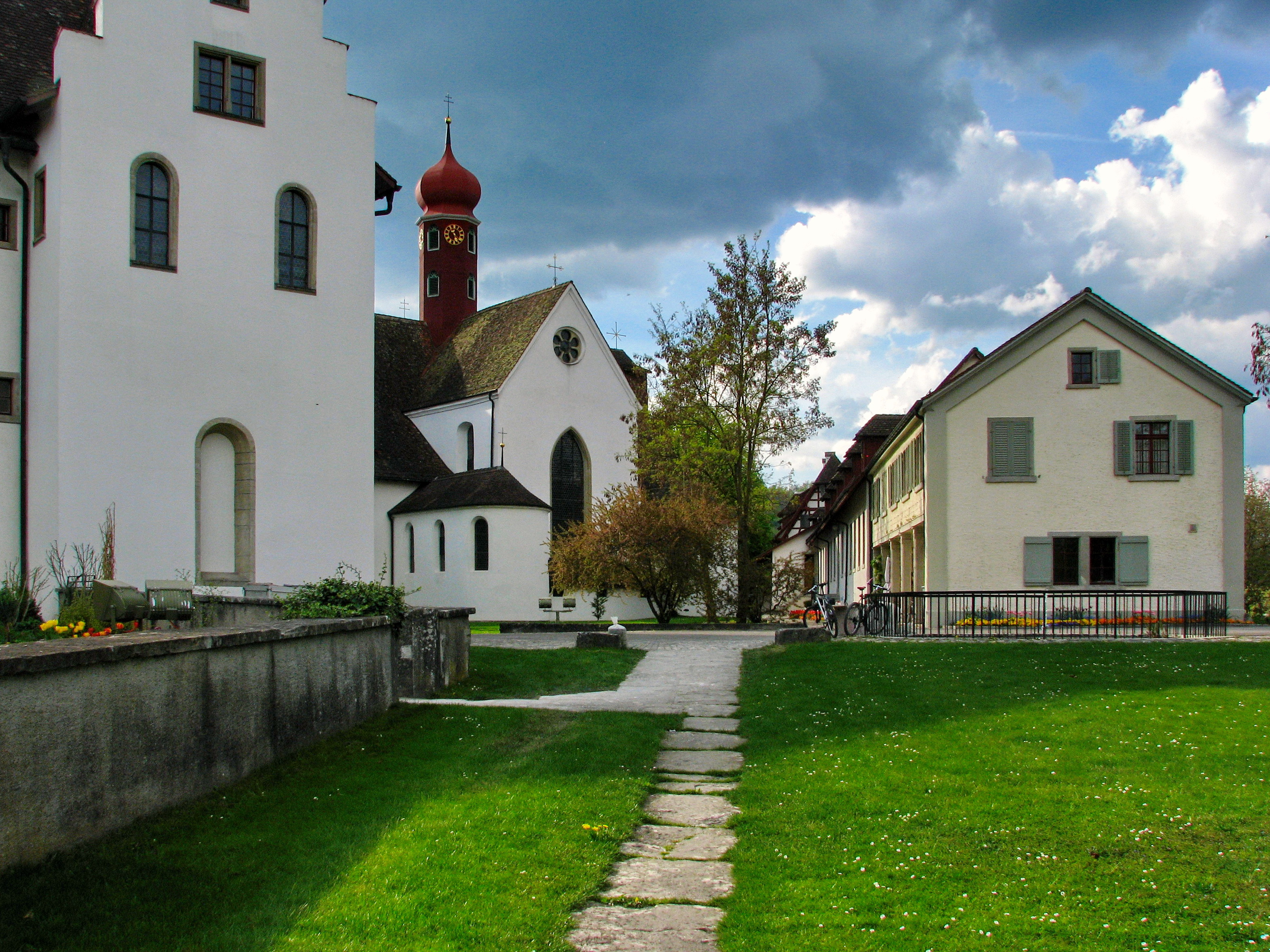 Kloster Wettingen in Wettingen